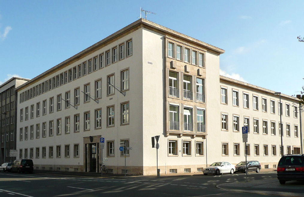 Kultusministerium Hannover